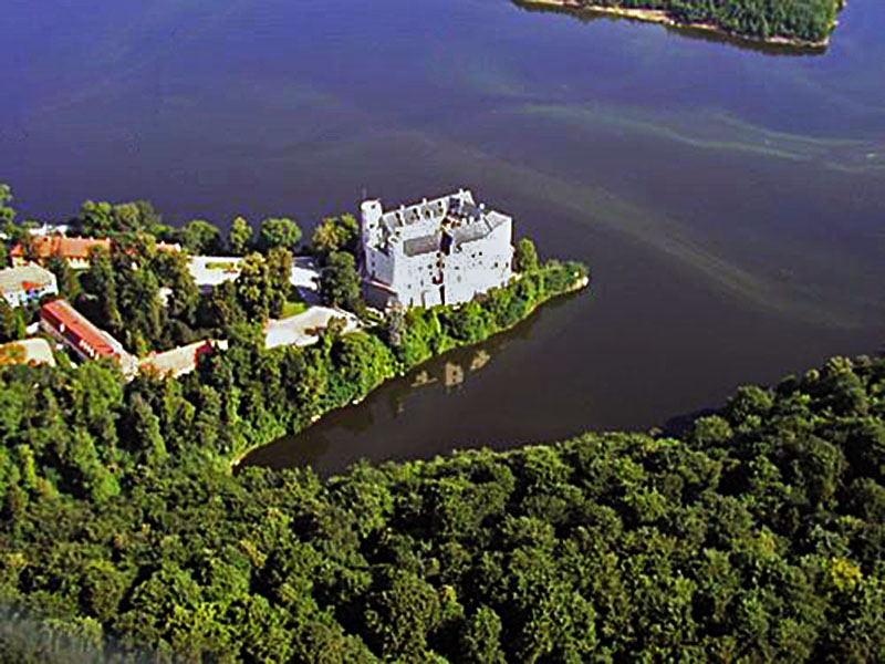 Beschreibung: Burg Orlík, Luftbild; Lizenzstatus: GNU FDL. Kategorie:Bild:Burg